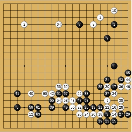 1968年8月21-22日 第8期名人戦(旧)挑戦手合七番勝負第1局1-64手目